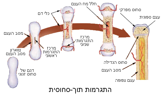 התגרמות תוך-סחוסית